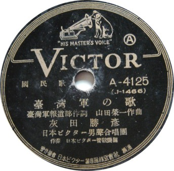 「臺湾軍の歌」曲盤(1940) (陳延寧先生珍藏)